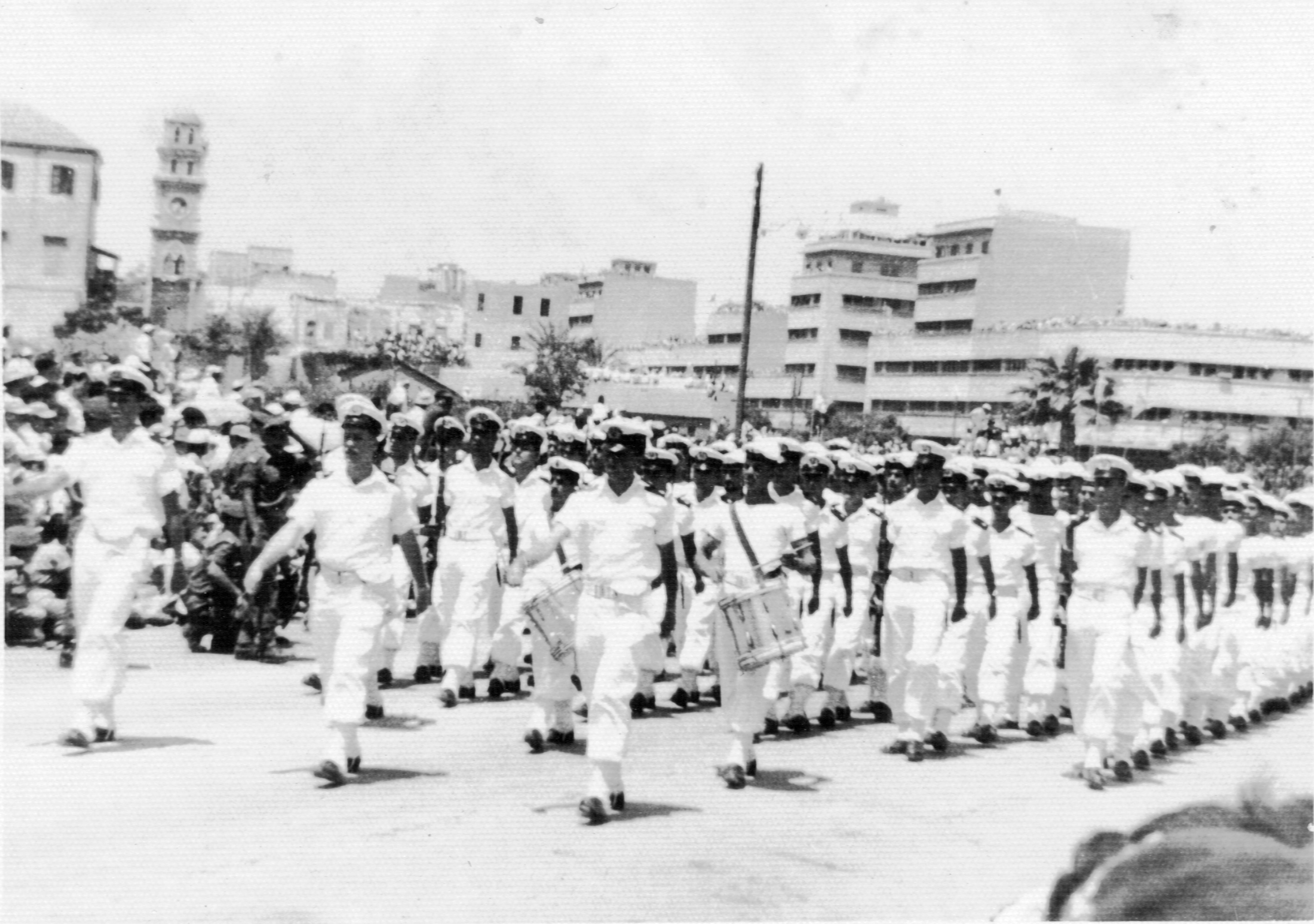 Parade of the Israel Defense Forces in 1960, Haifa מצעד יום העצמאות שהתקיים בחיפה בשנת 1960. התמונה צולמה ברחוב דרך העצמאות מזרחית לרחוב הסראיה, ליד קרית הממשלה של היום ומגדל המפרש. חיילי חיל הים מימין הבתים ברחוב דרך העצמאות משמאל המסגד הקטן